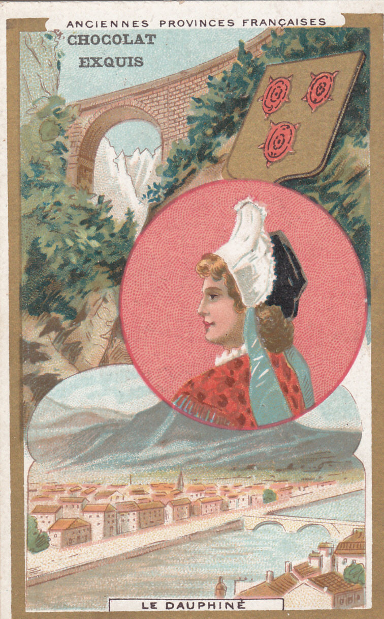 Coiffe du Dauphiné. Chromo. Au fond, Grenoble.